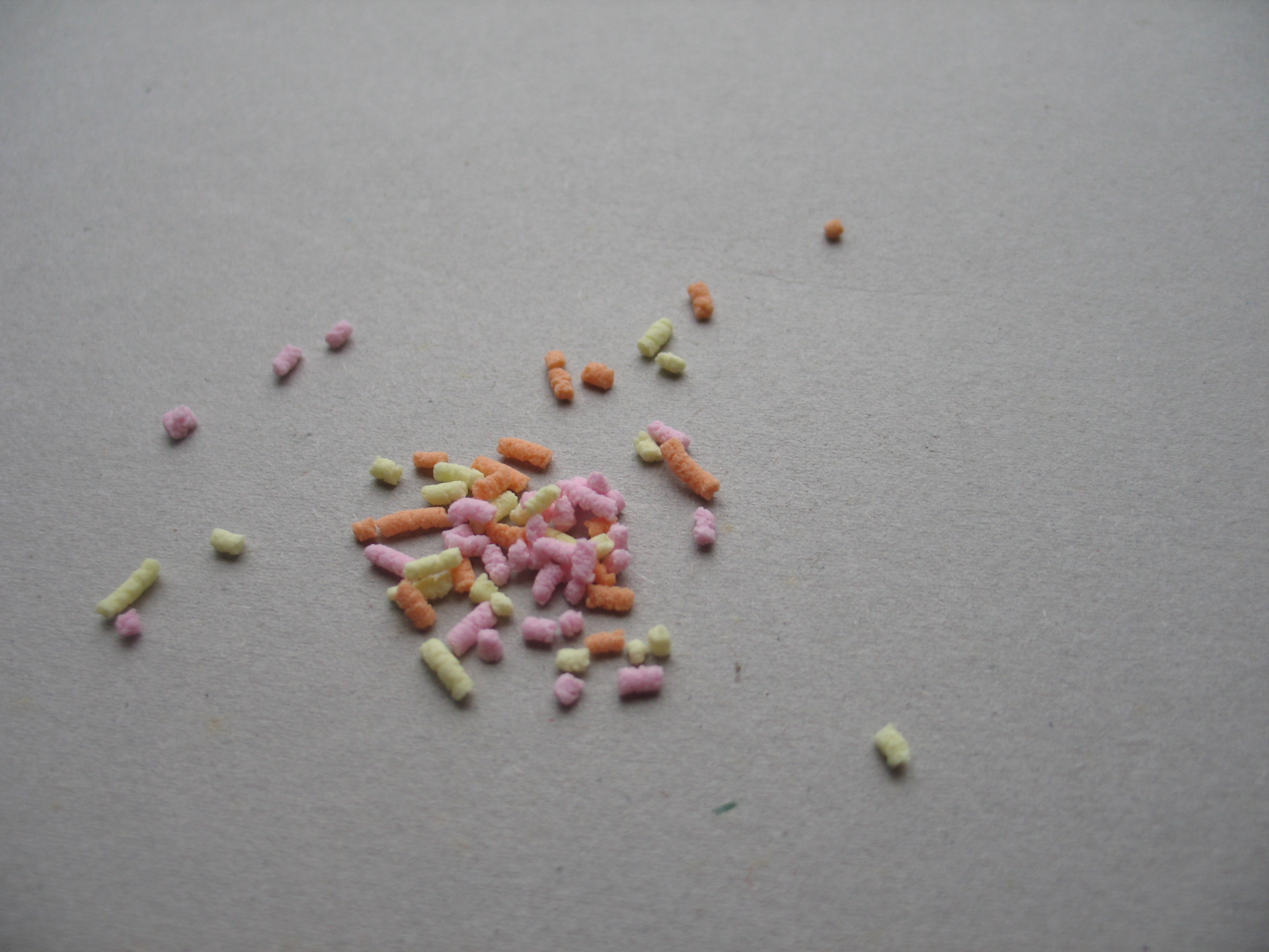 Vruchtenhagelslag